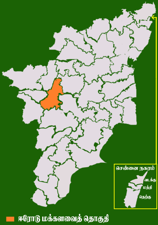 தமிழக வரைபடத்தில் உள்ள ஈரோடு மக்களவைத் தொகுதி